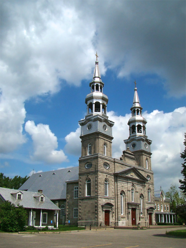 Église de la Visitation de la Bienheureuse-Vierge-Marie, Montréal, Québec, Canada.